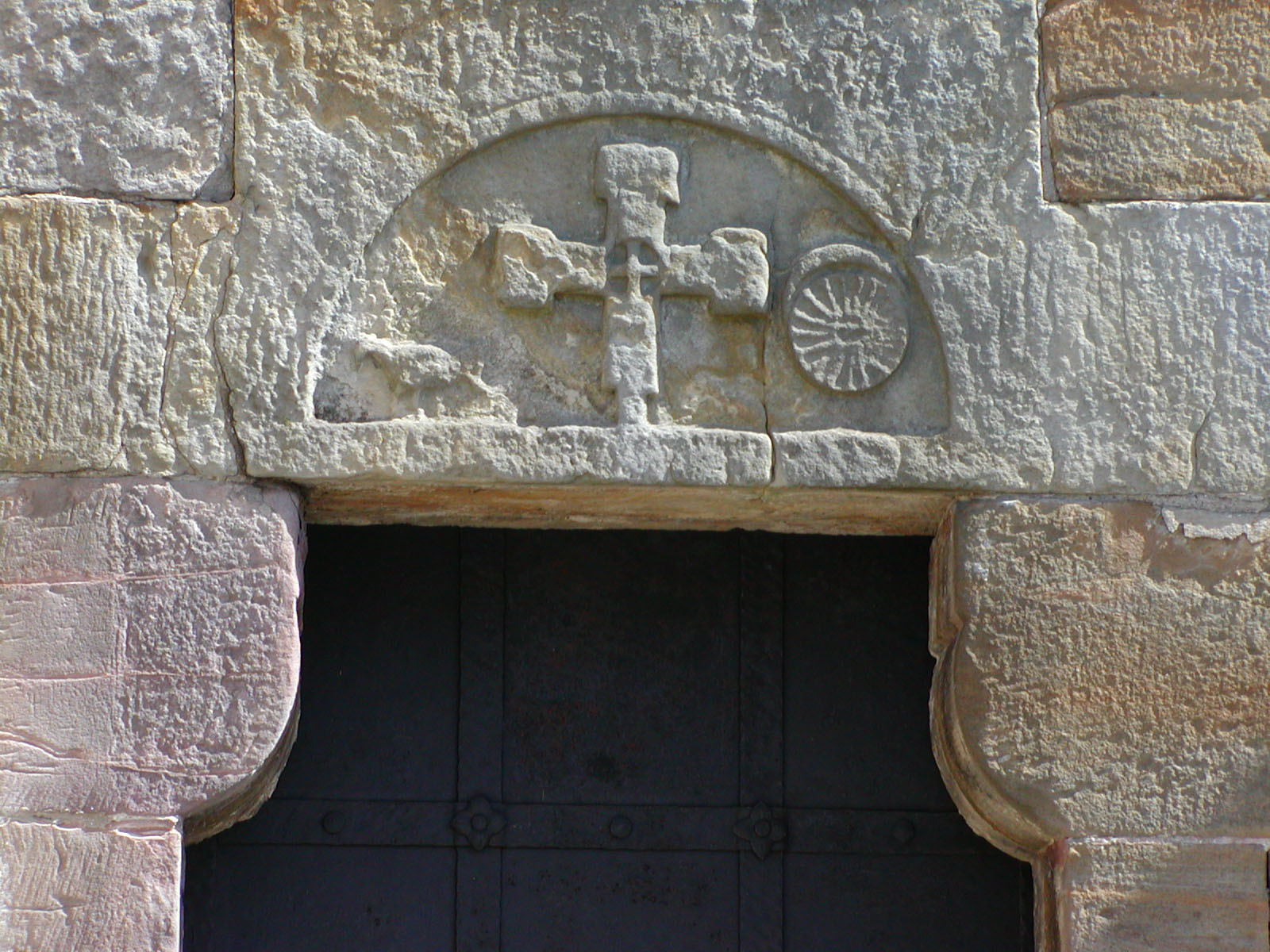 Saint Thomas of Canterbury church in Sulejów Romański tympanon z płaskorzeźbionym krzyżem wczesnochrześcijańskim - po bokach słońce z księżycem i ptak jako symbole śmierci Chrystusa